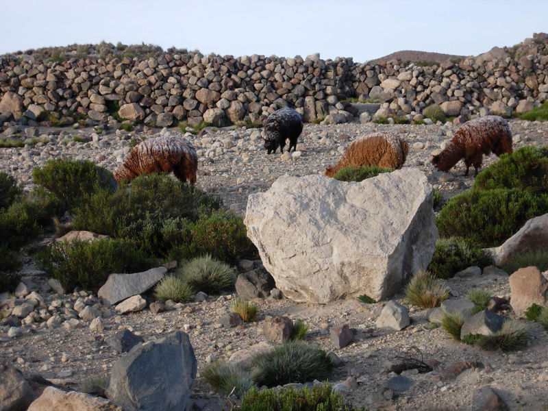 Alpacas am Morgen mit Raureif auf dem Rücken (selbst aufgenommen)